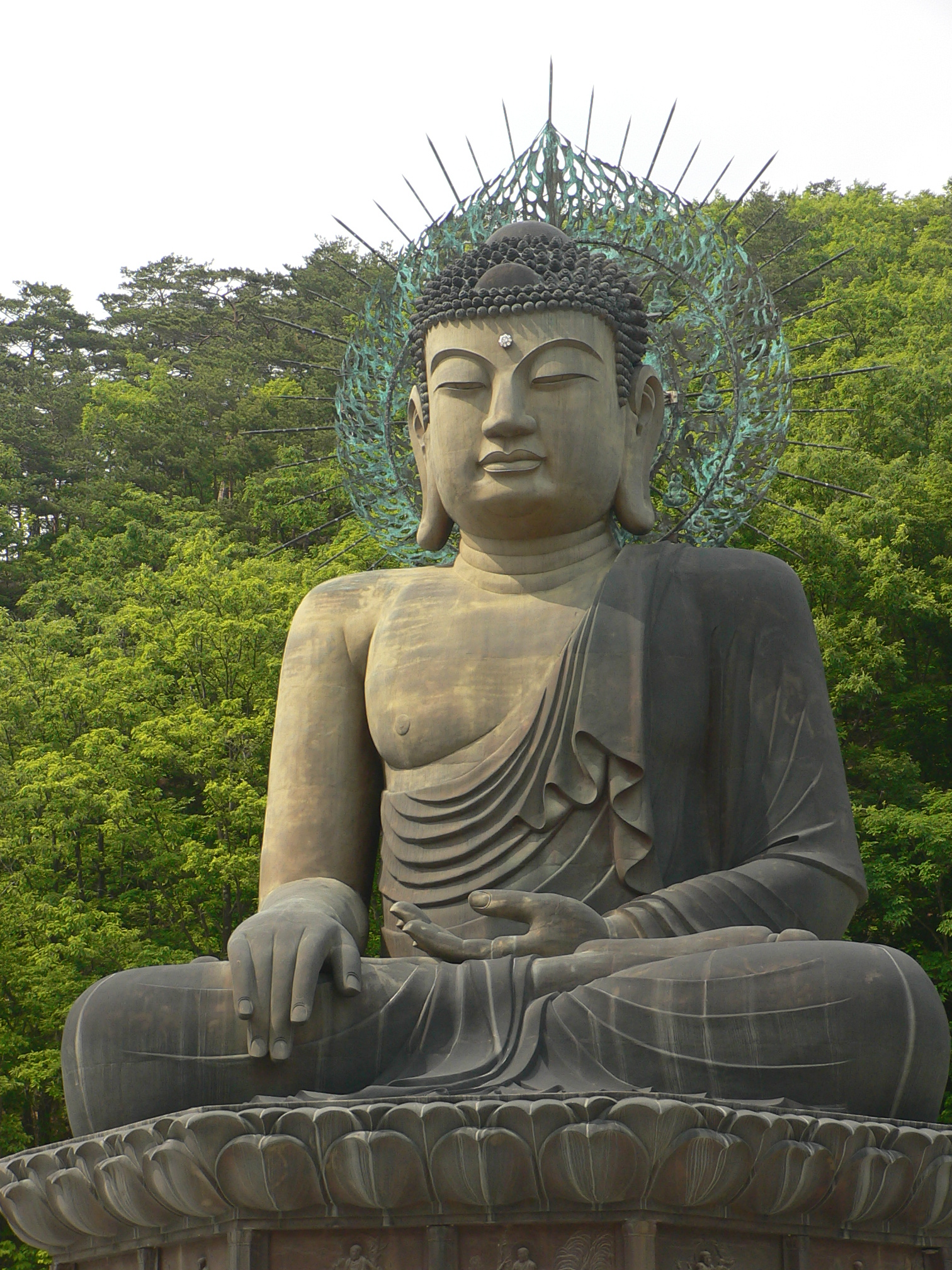 Giant Buddha statue in Seoraksan (Mt.Seorak), Gangwon-do, South Korea